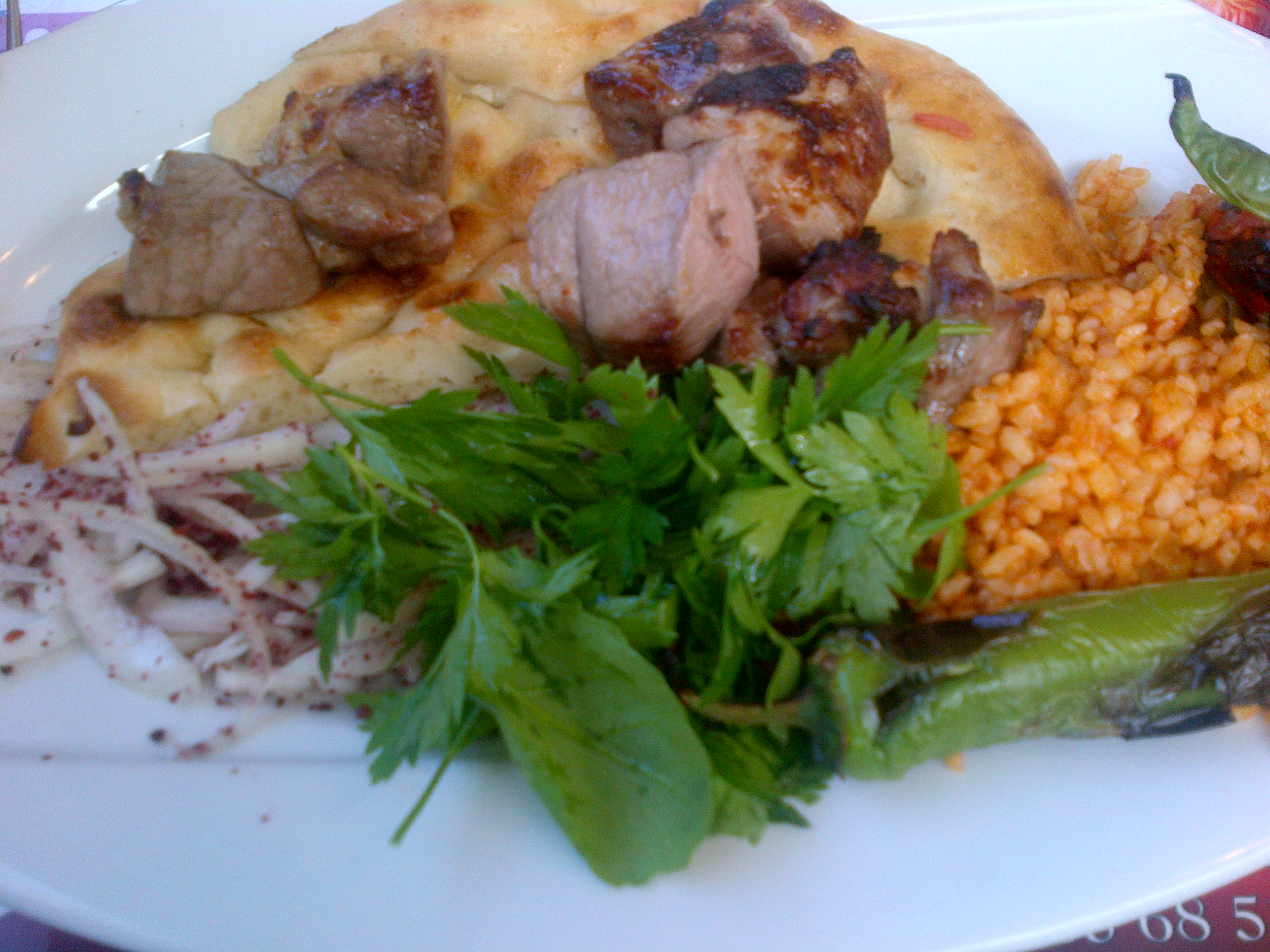 "Kuzu şiş" o "şiş kebap" de carne de cordero, recién sacada del "şiş" o brocheta, de la cocina turca.